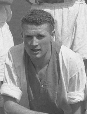 Loek den Edel.